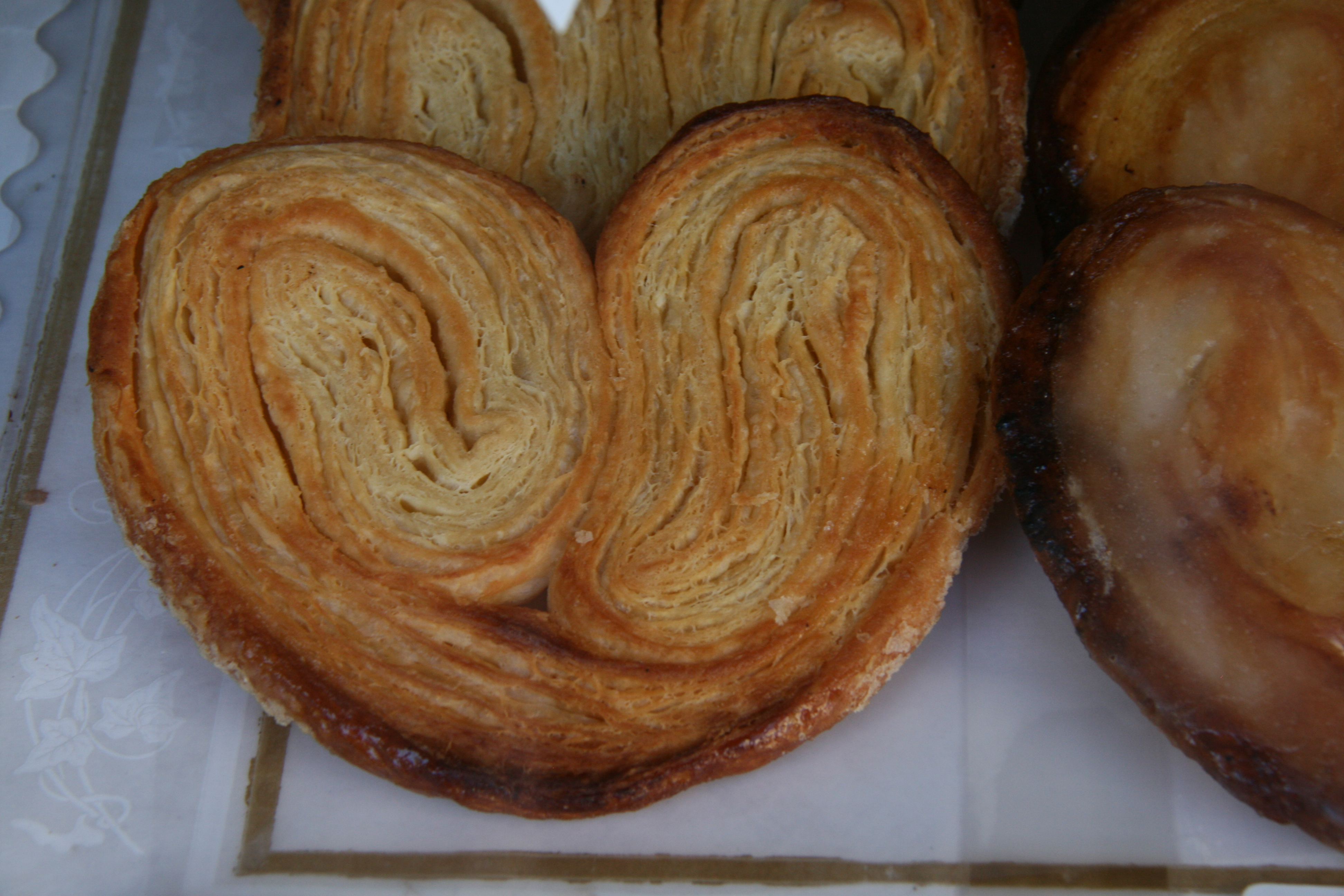 Palmeras, a la derecha puede verse la porción de una palmera glaseada